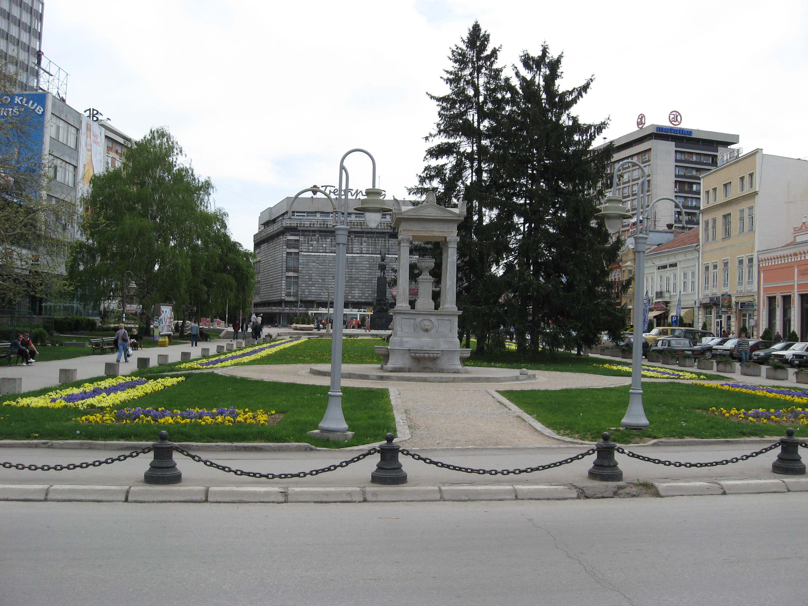 Dragan Cvetkovic Nis Nis centar grada prolece, sopstvena slika